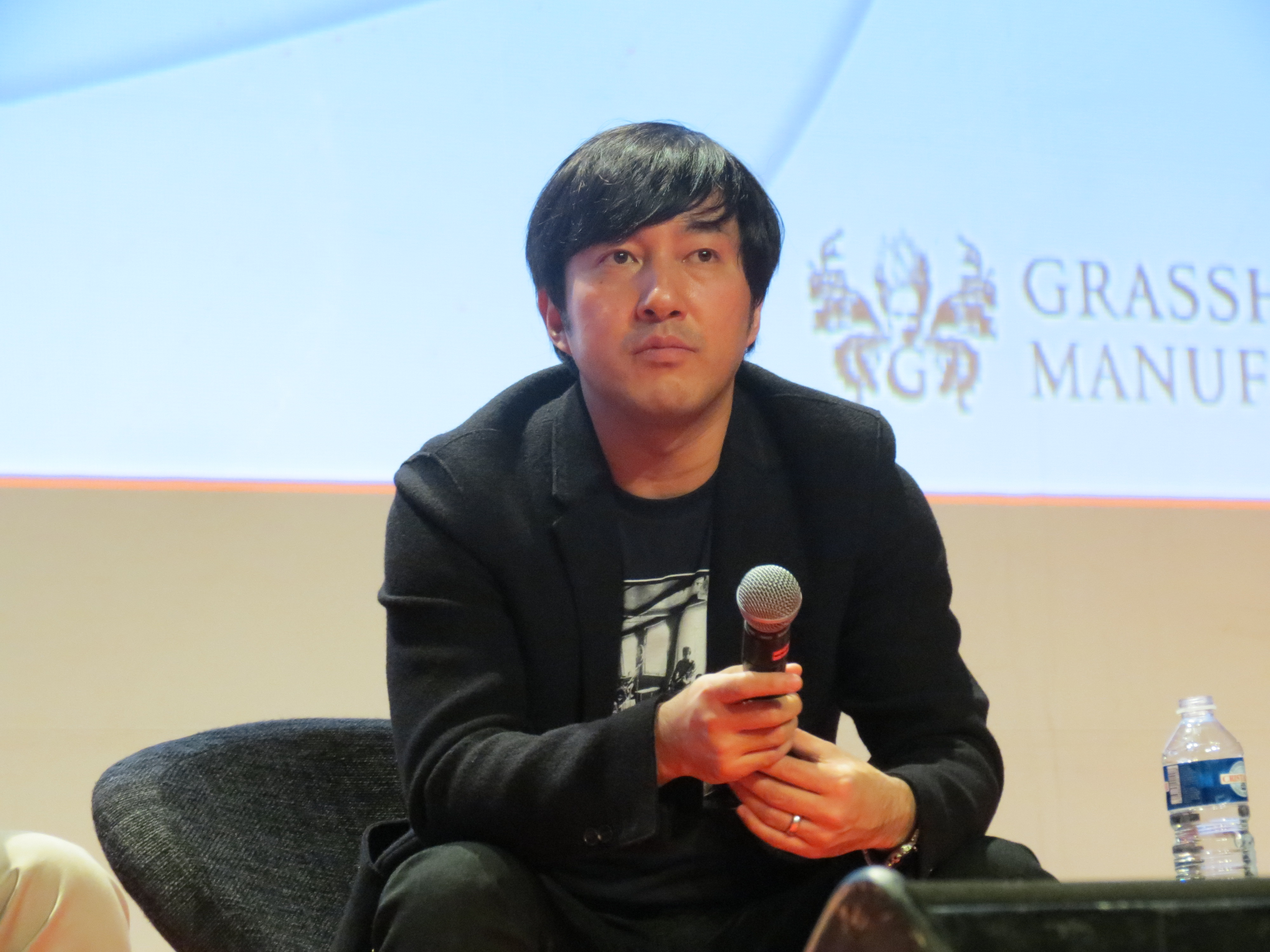 Suda Goichi au Toulouse Game Show 2012